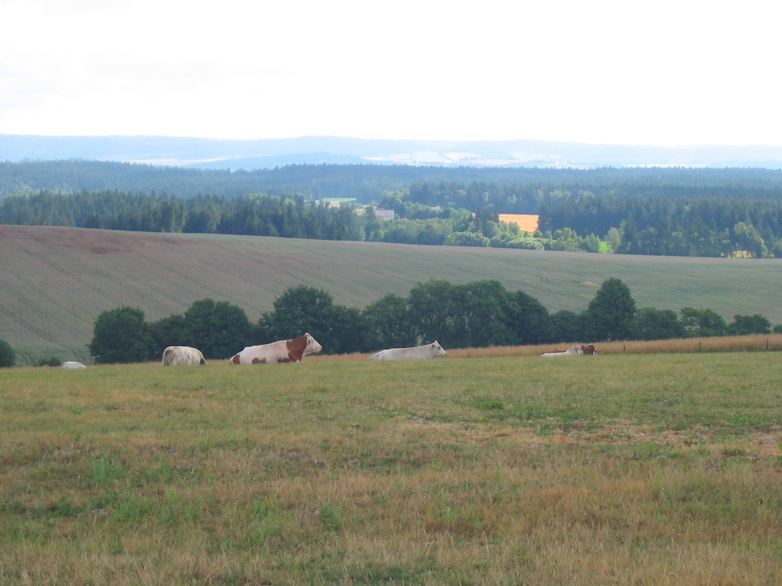 Pohled na Žďárské Vrchy od obce Rosička.